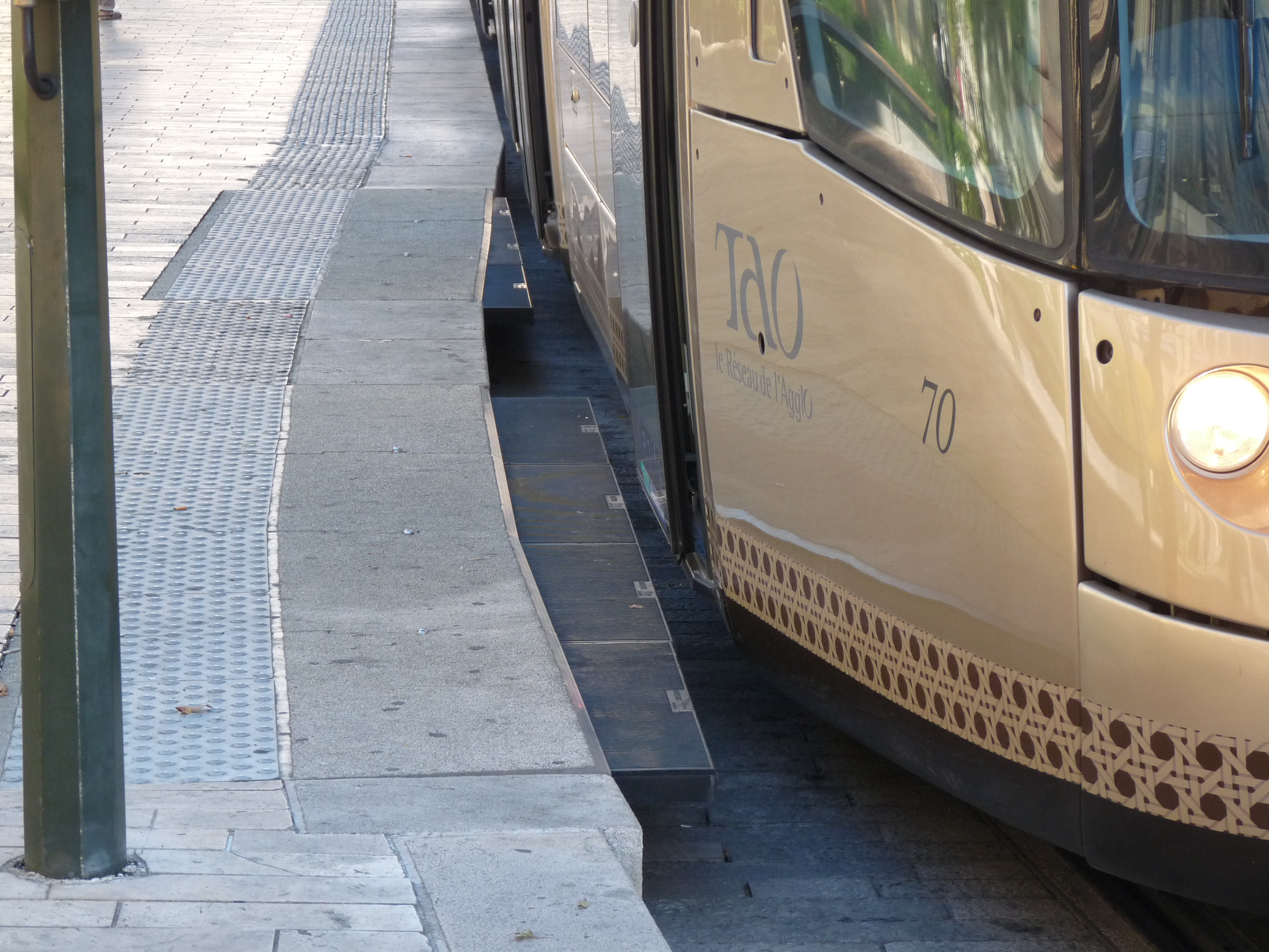 De extra zwaairuimte wordt opgevangen door uitschuifbare perrongedeeltes